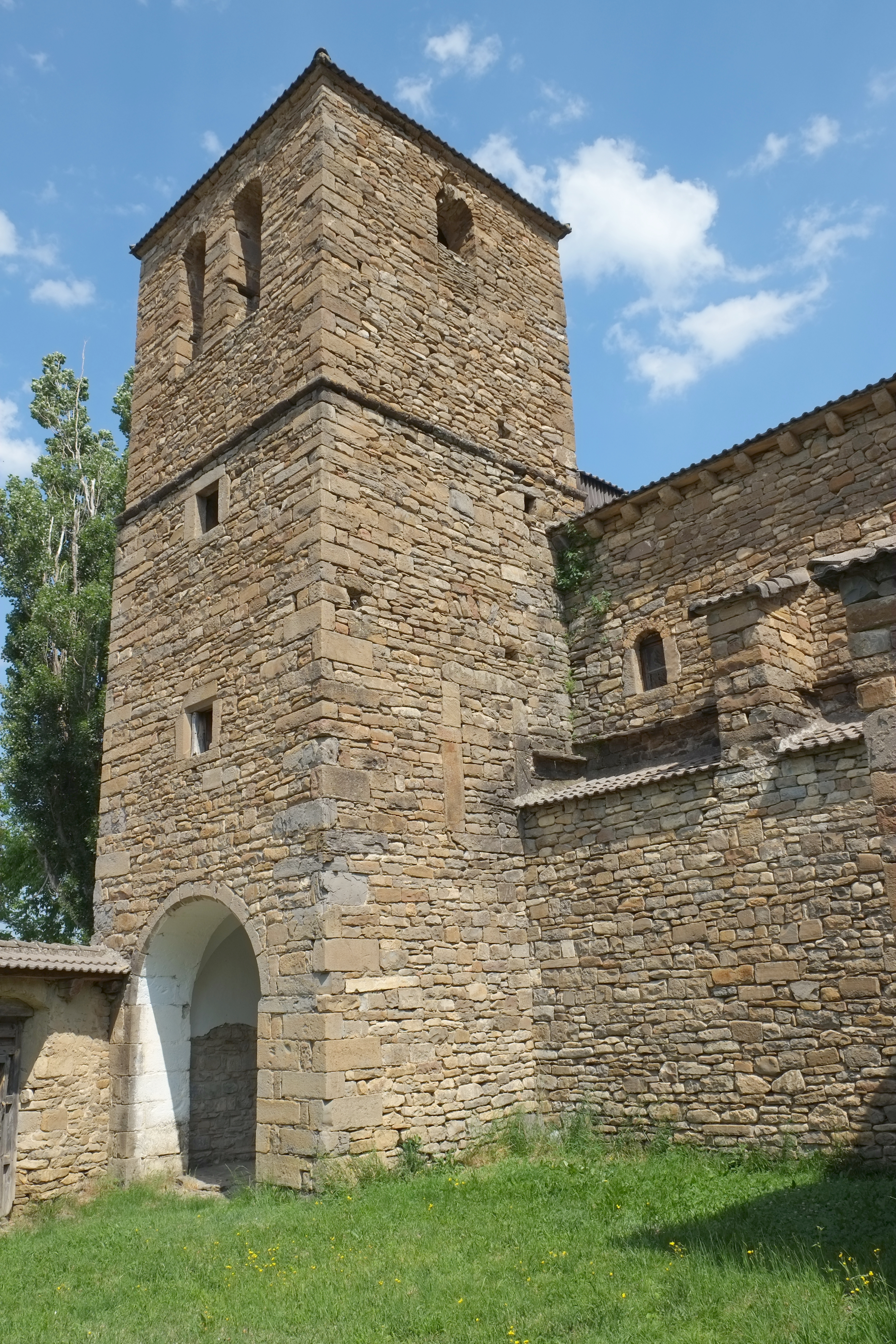 Kirche in Javierre del Obispo, einem Ort in der Provinz Huesca in Aragonien (Spanien)